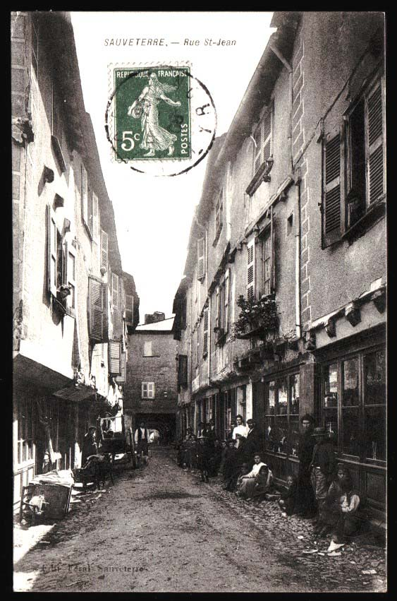 Carte postale expédiée en 1908, Sauveterre-de-Rouergue, rue Saint jean